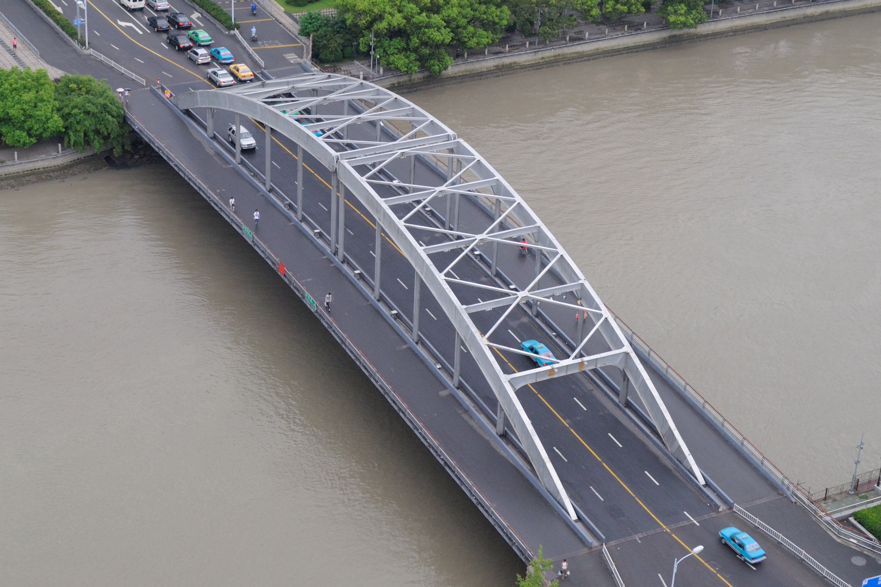 宁波灵桥俯视